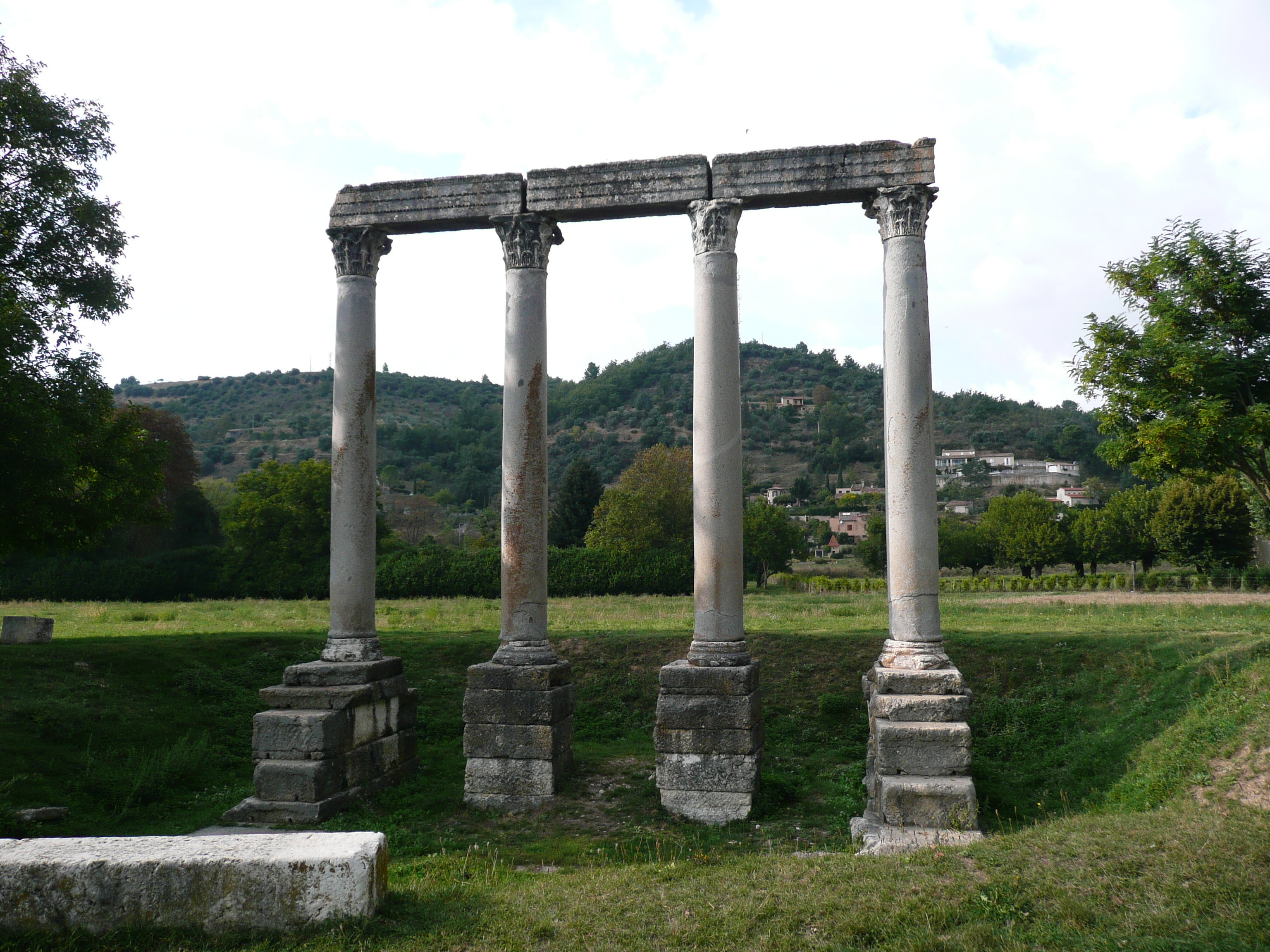 Roman temple C1 CE